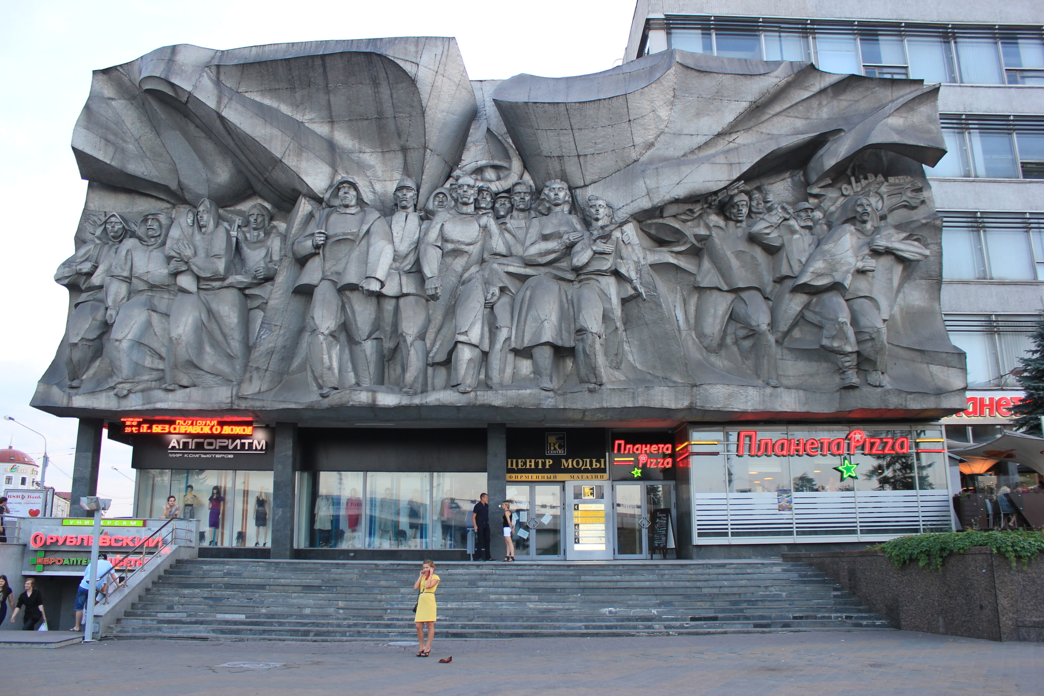 Betonrelief "Solidarnost" in Minsk, Belarus.